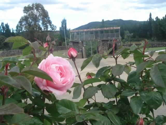 Fuerte Santa Juana de Guadalcazar